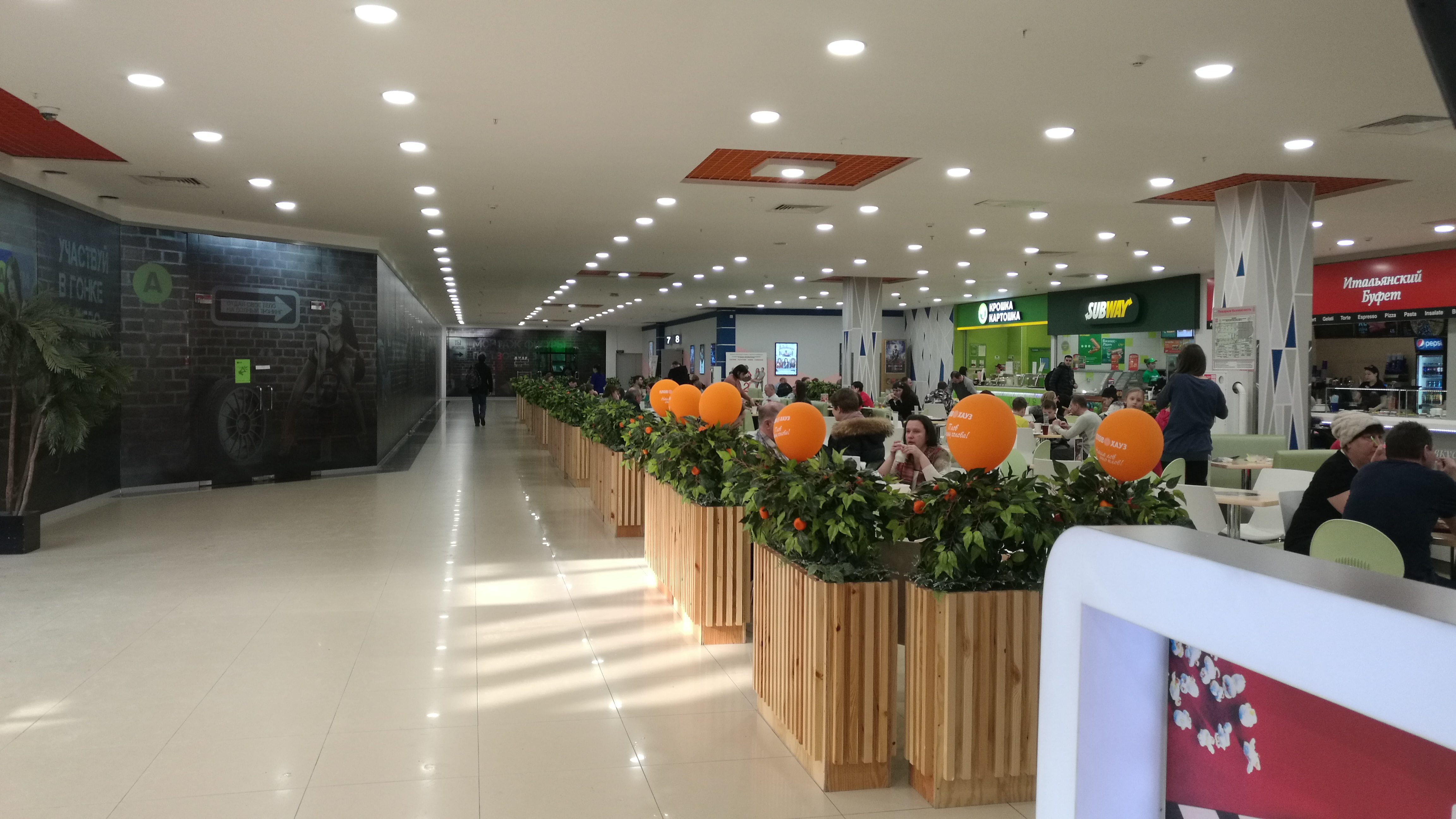 Manĝokorto en la aĉetcentro "Premier". Tjumeno, Rusio.